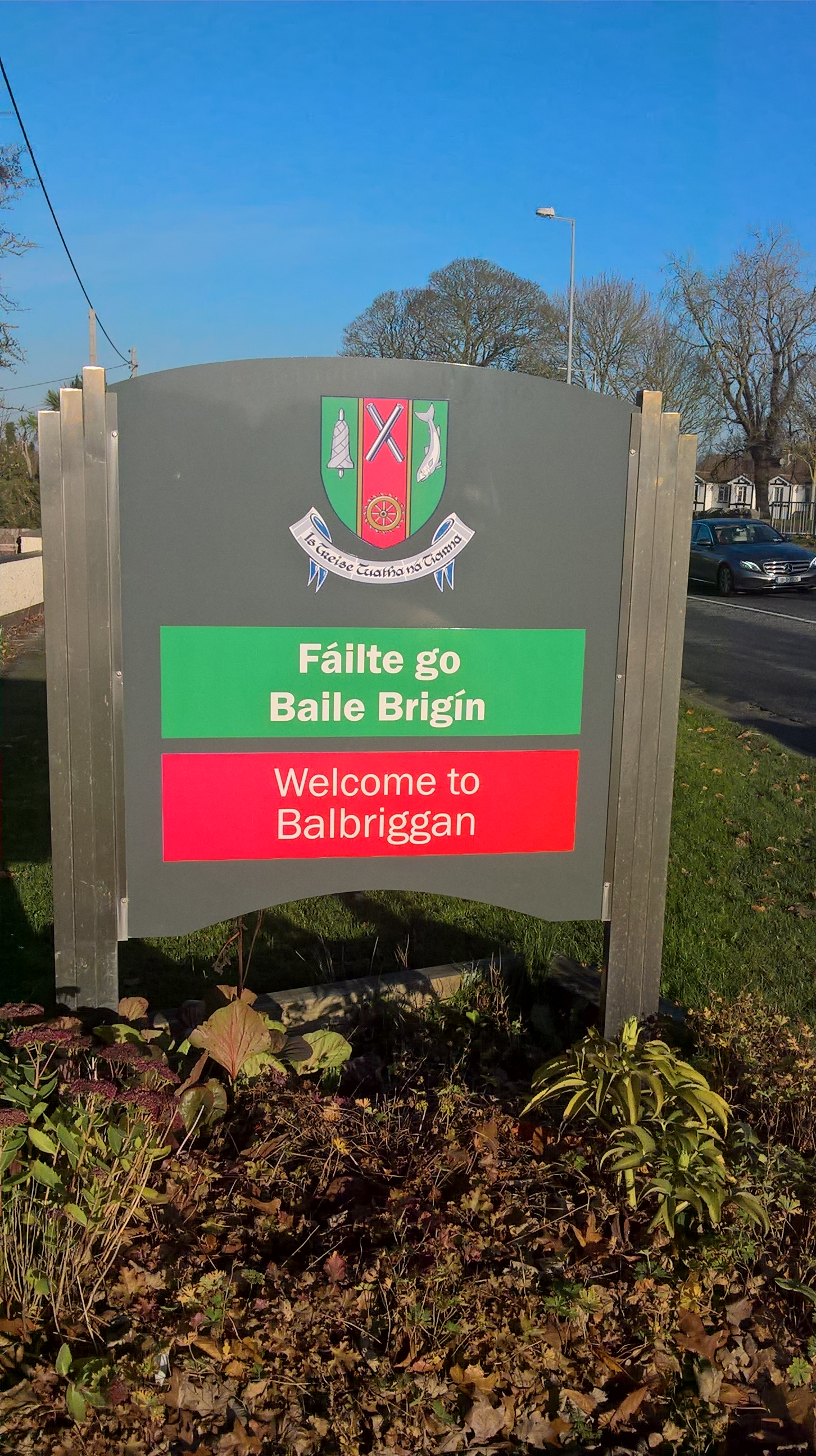 Comhartha fáilithe dátheangach i mBaile Brigín.